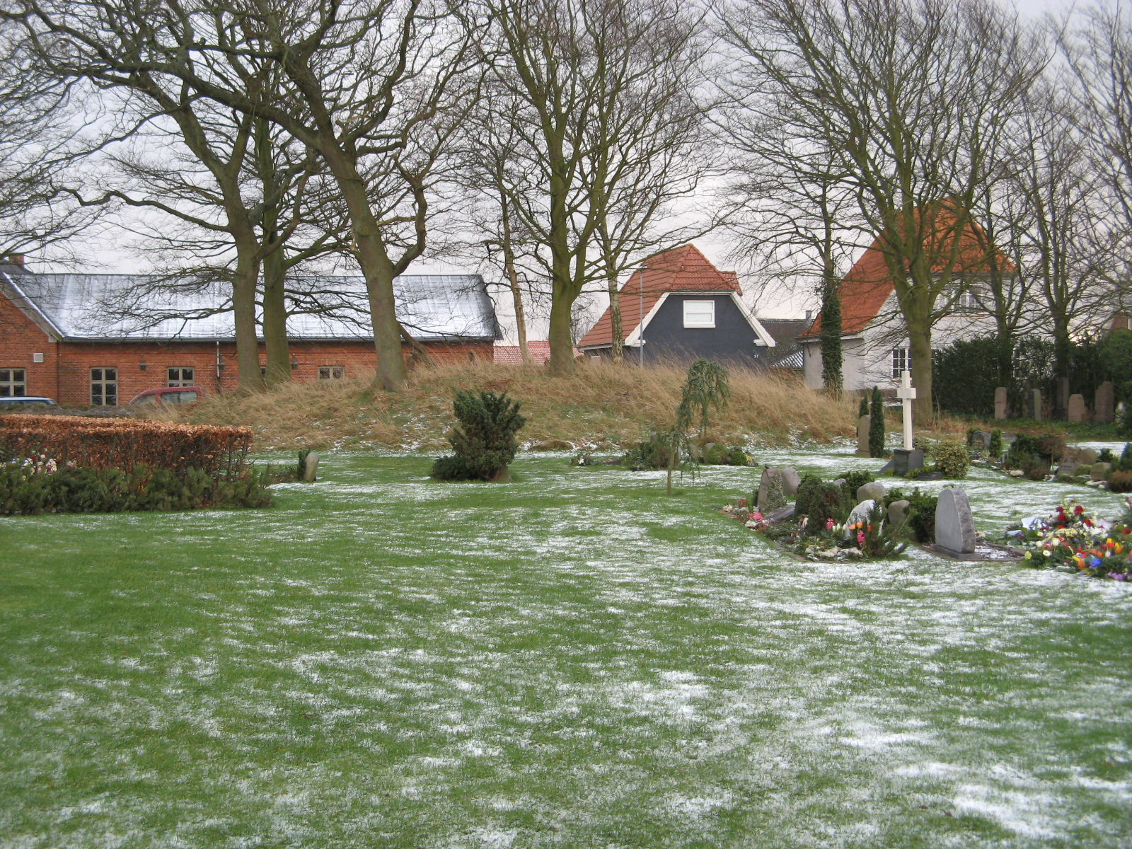 Jerne Kirke, Jerne sogn, Esbjerg kommune (former: Skads Herred, Ribe Amt). Gravhøj fra oldtiden placeret i kirkegårdens sydvestre hjørne.